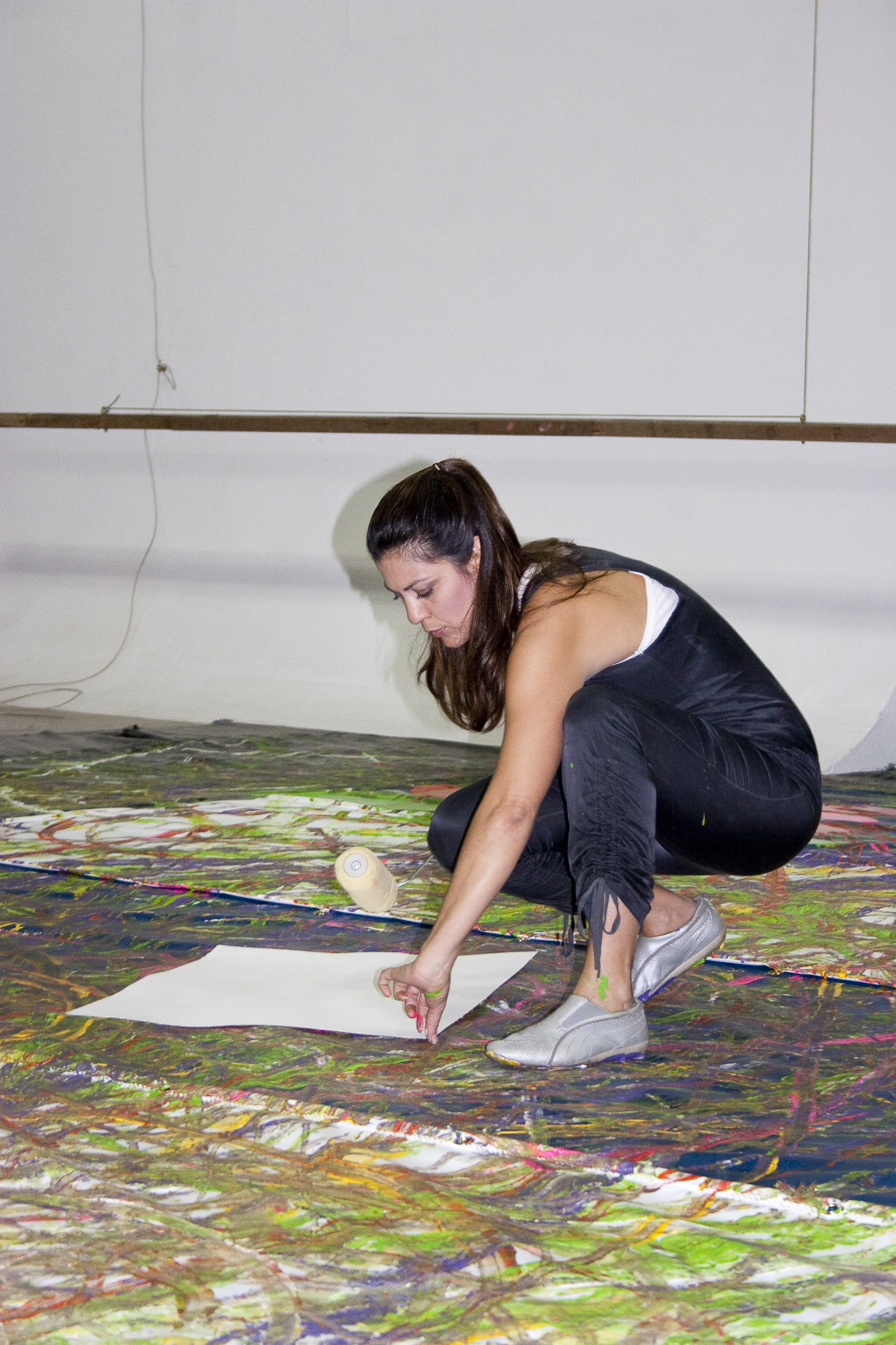 Diana Lopez - Pintura de accion en dos tiempos. Caracas, 2009